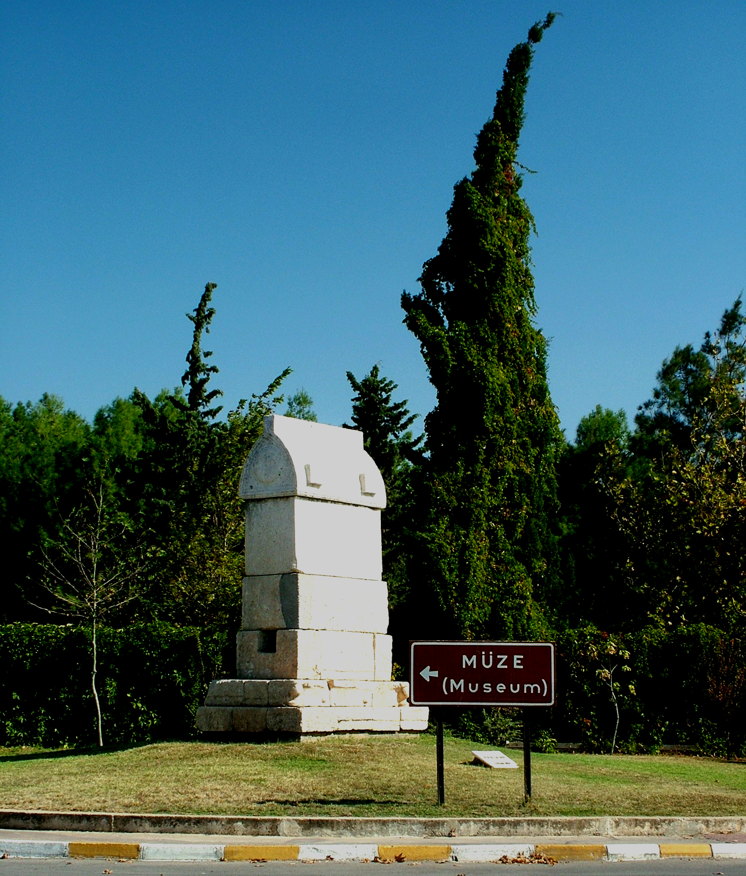 Régészeti Múzeum, Antalya, Törökország